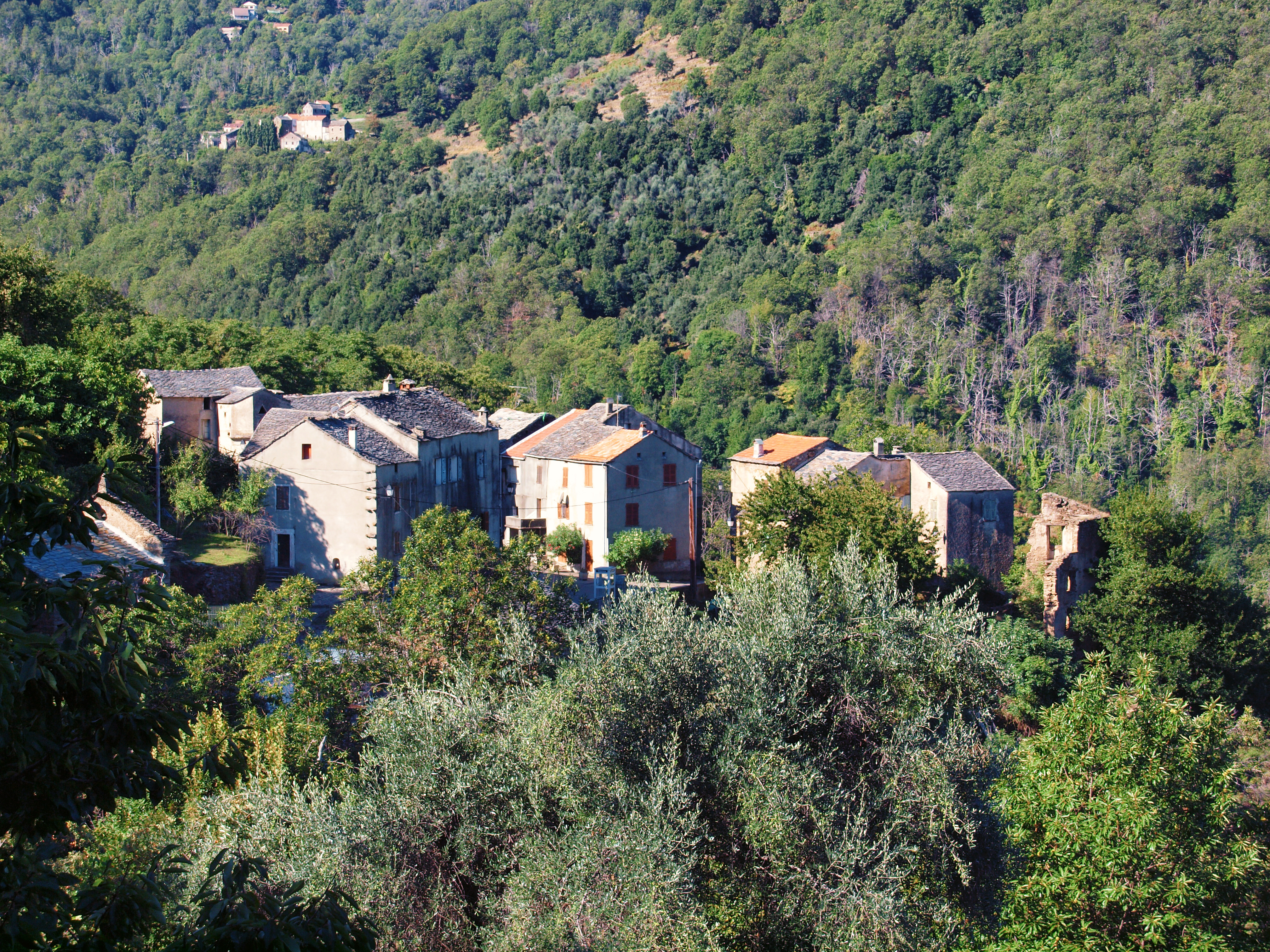 Penta-Acquatella, Castagniccia (Corse) - Village d'Acquatella. À gauche, la chapelle Sainte-Anne